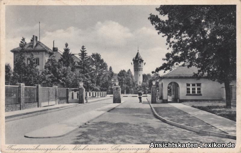 Ort: Neuhammer a. Queis Gebiet: Schlesien Beschreibung: Truppenübungsplatz, Hauptor